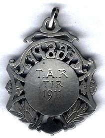 Avers de médaille datée 1911